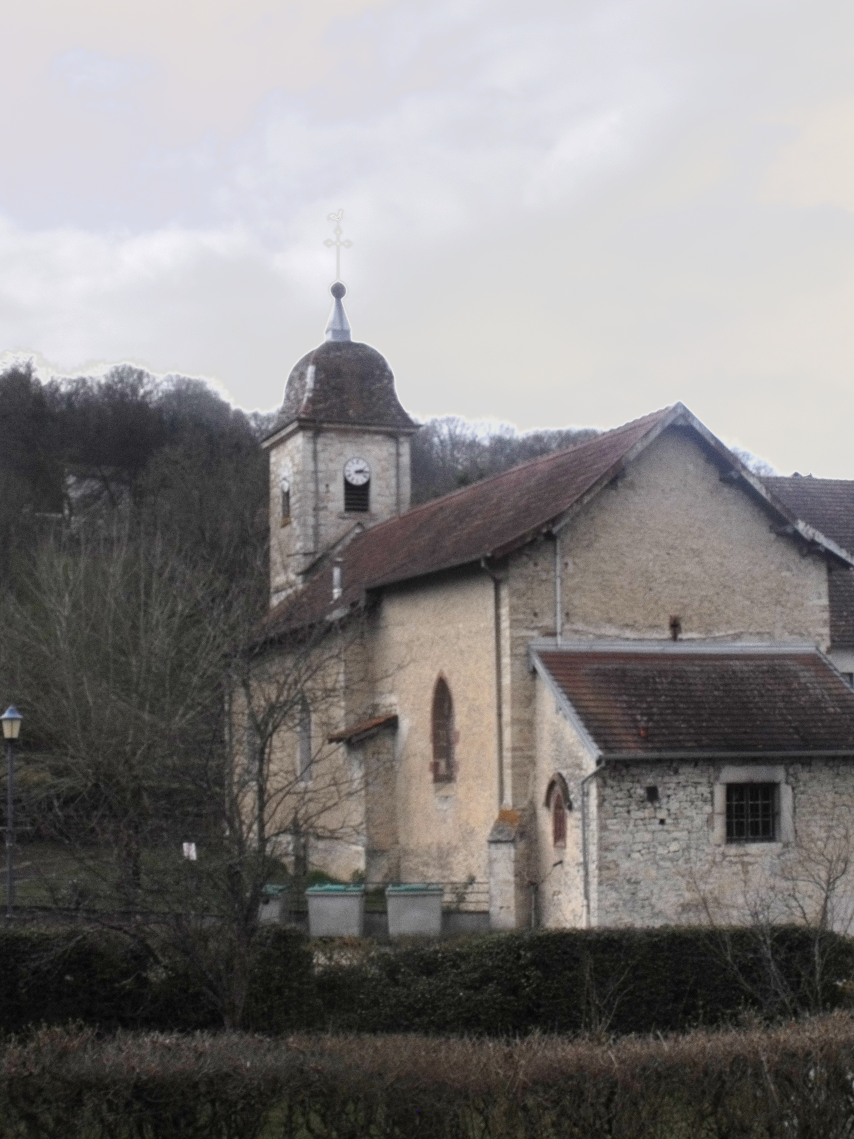 Eglise de Blussans, Doubs, France